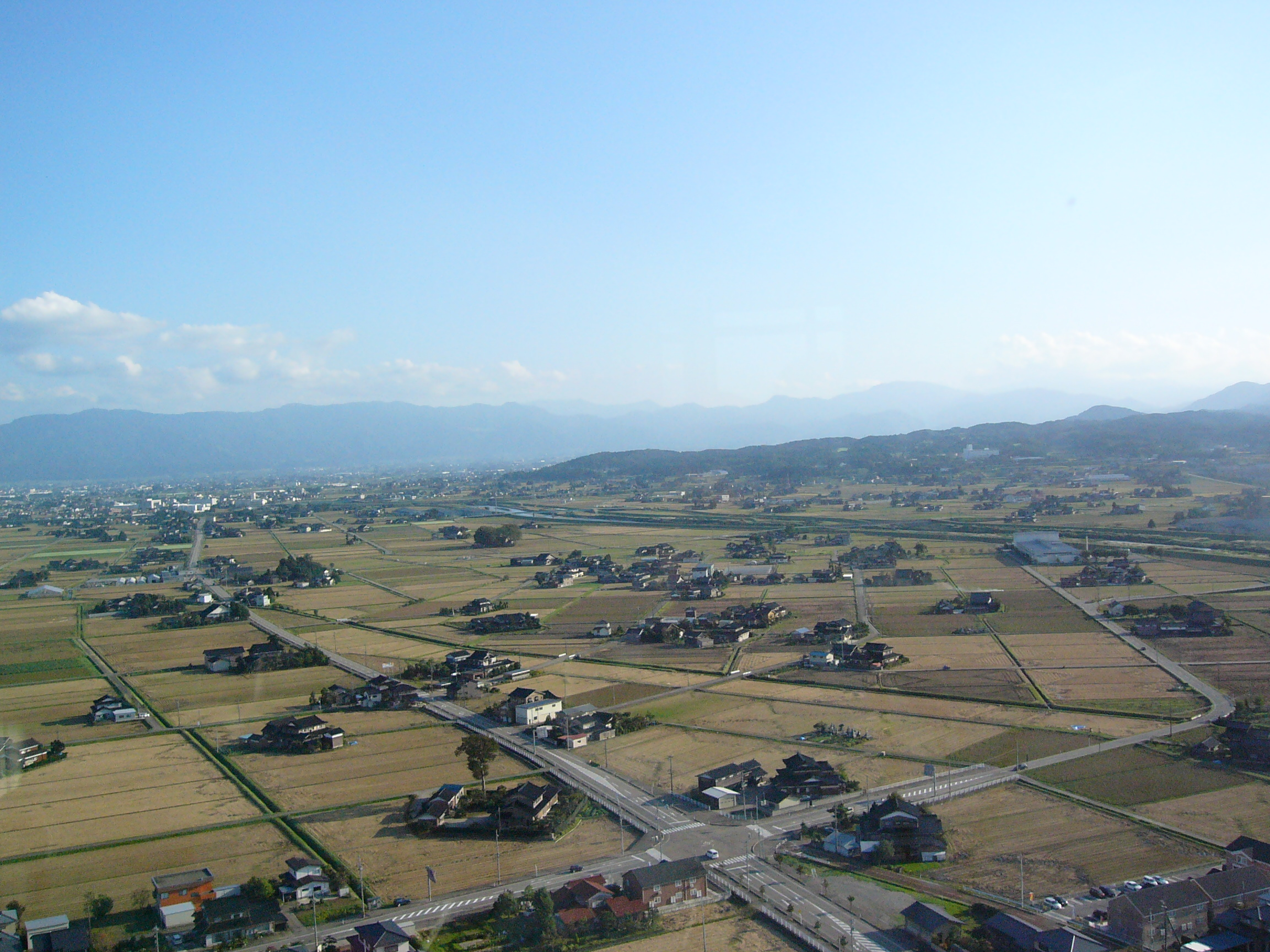 富山県小矢部市のクロスランドおやべのクロスランドタワーからの眺望。四季折々の散居村の眺望を楽しめる。